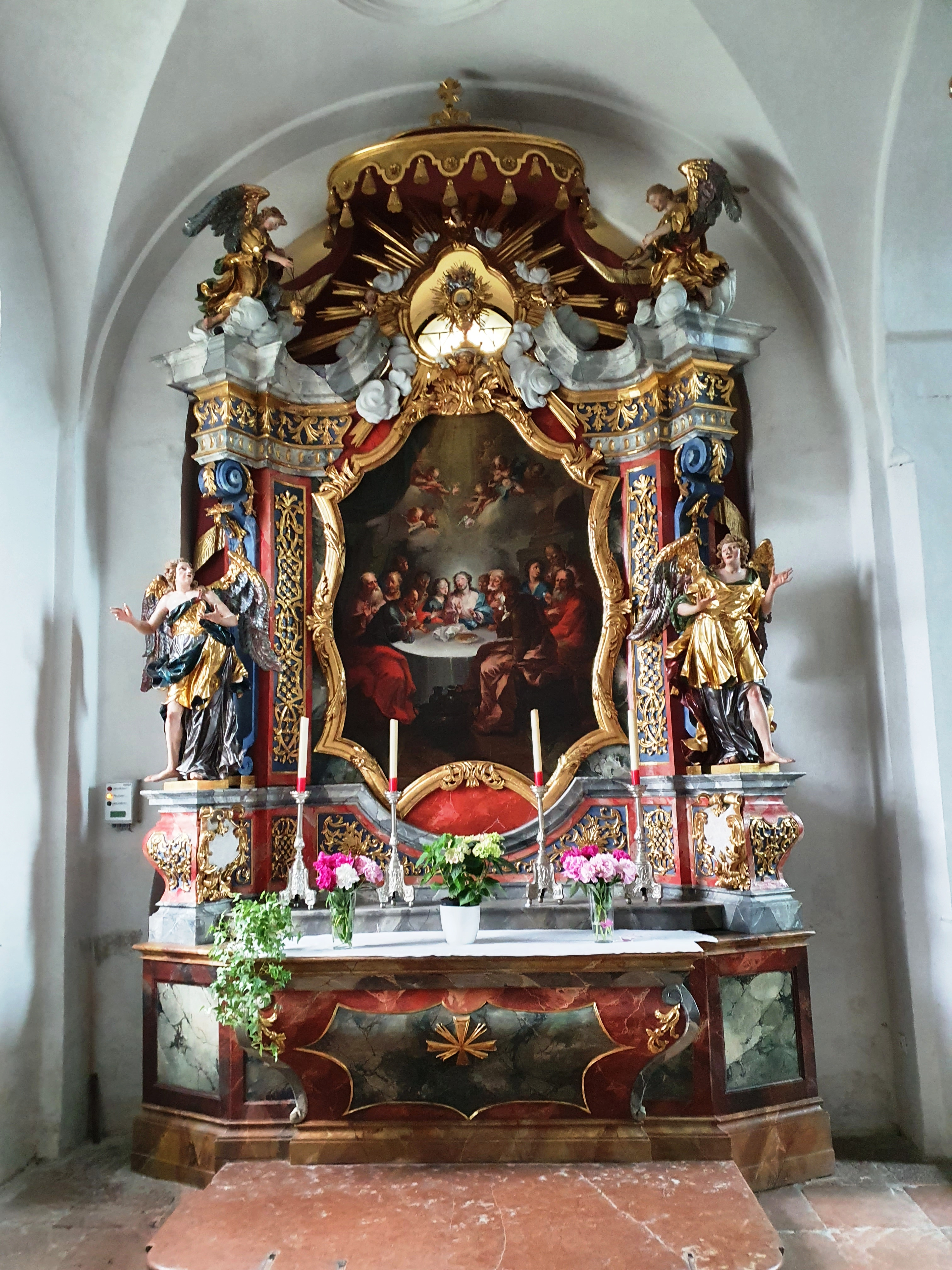 Aufbau von Josef Krimpacher 1736, Altarblatt Letztes Abendmahl von Franz Christoph Mayrhofer